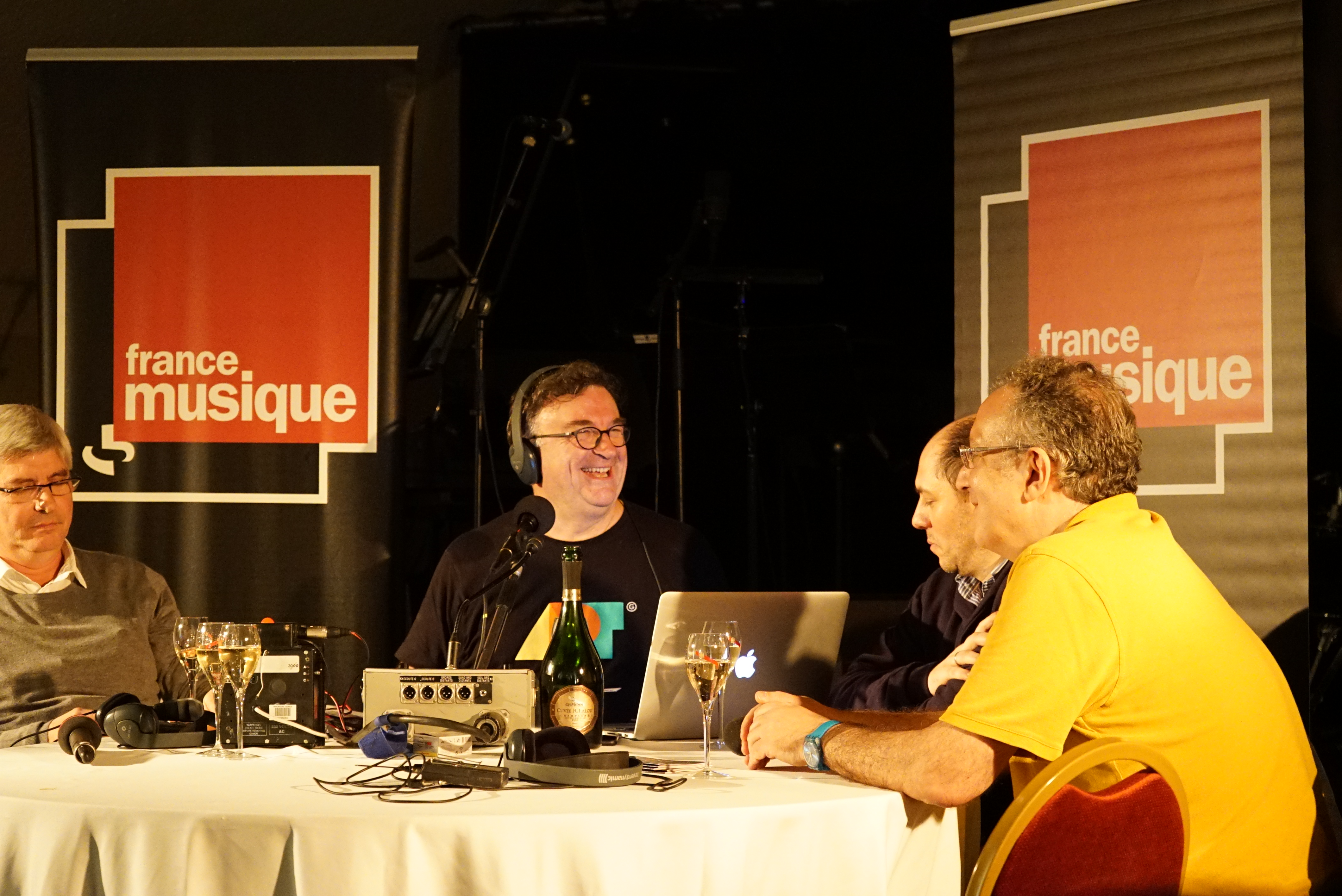 Open Jazz faisant l'ouverture du Reims Festival.